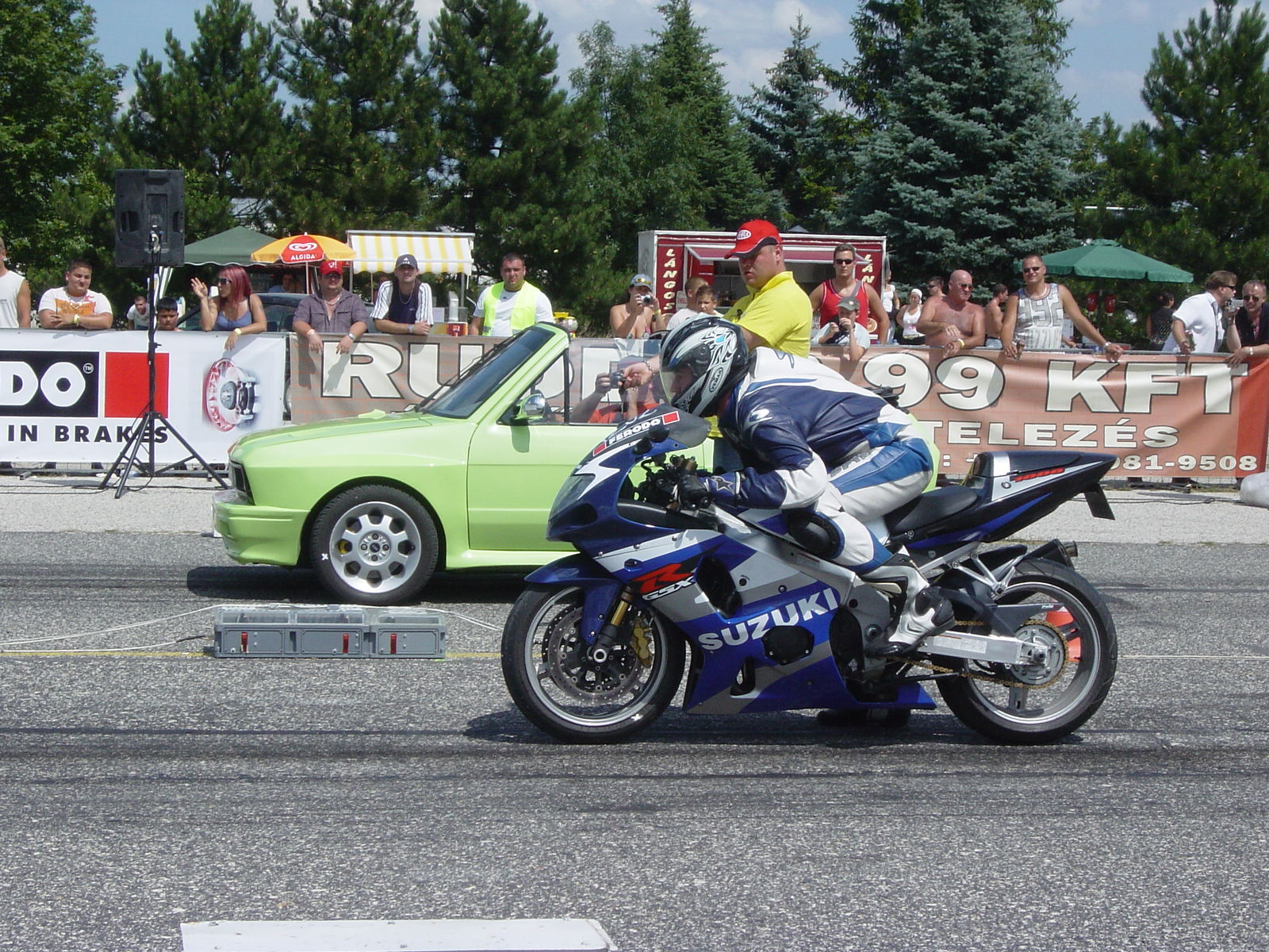 Zastava Yugo 55 vs Motorcycle